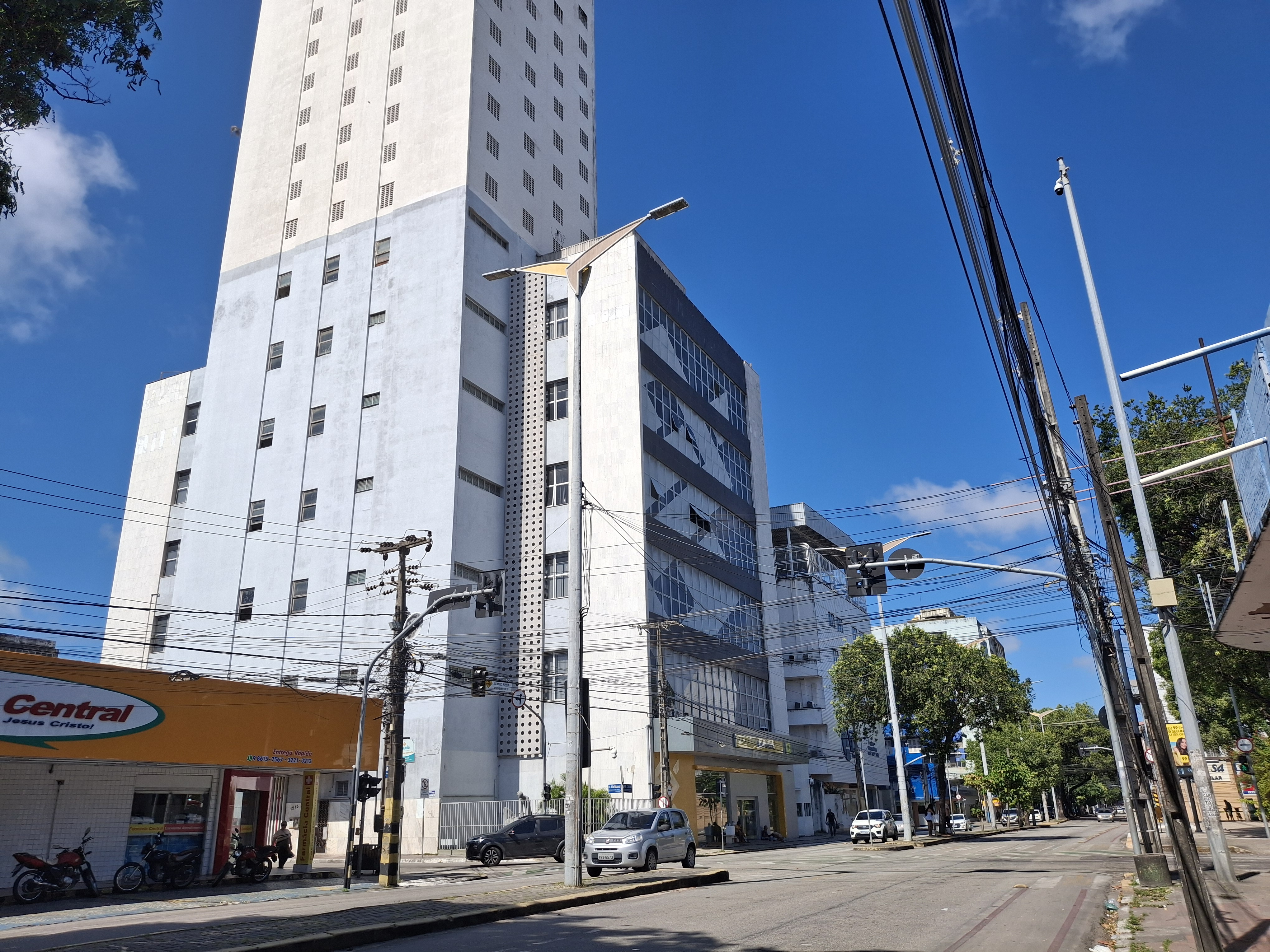 Agência Amargosa